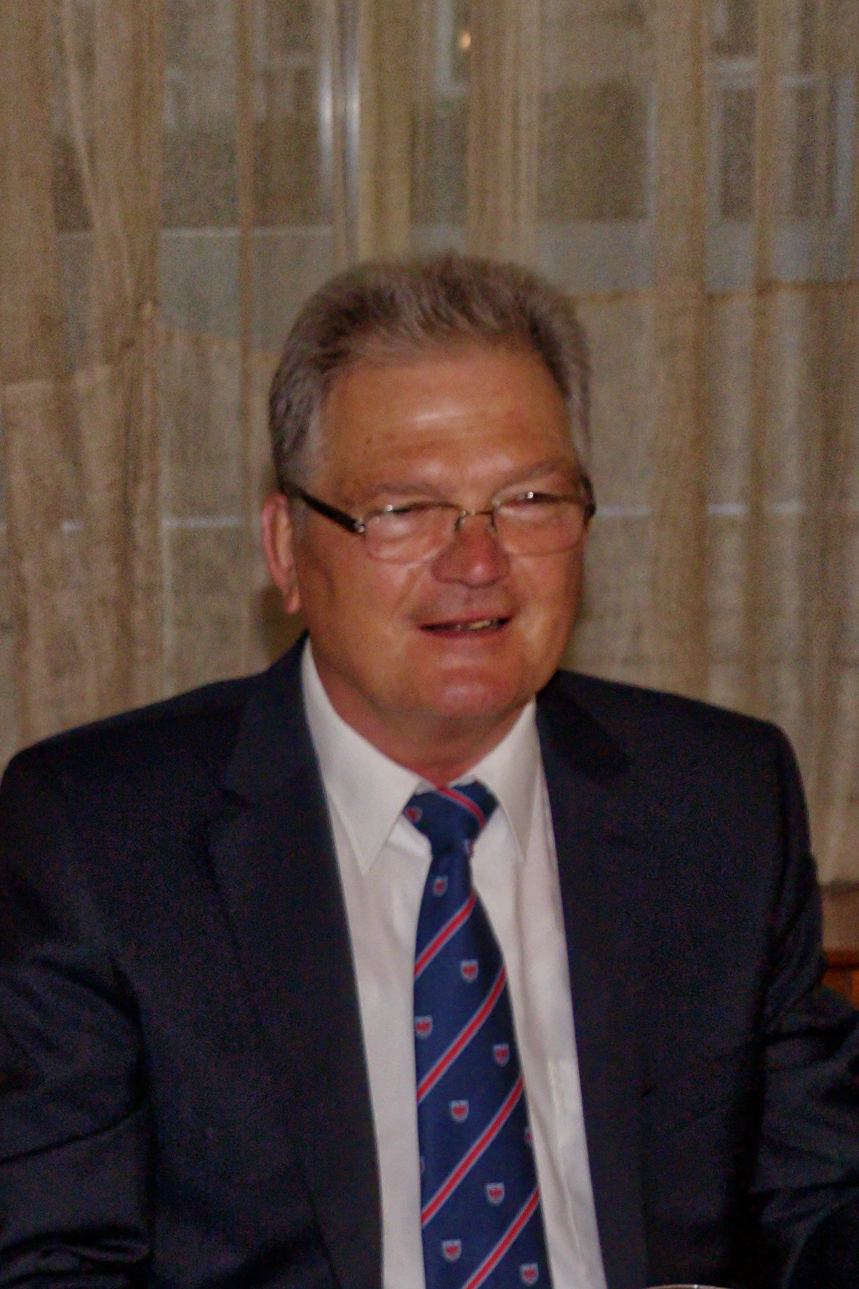 Prof. Dr. Hans Hecker